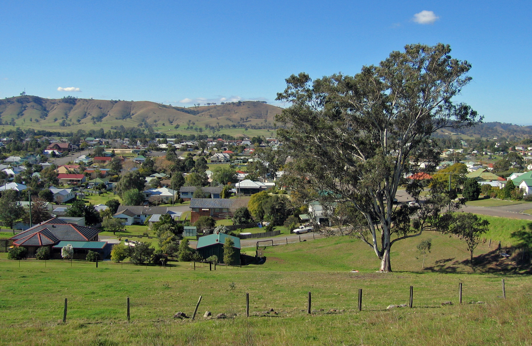 Dungog, NSW, Australia.